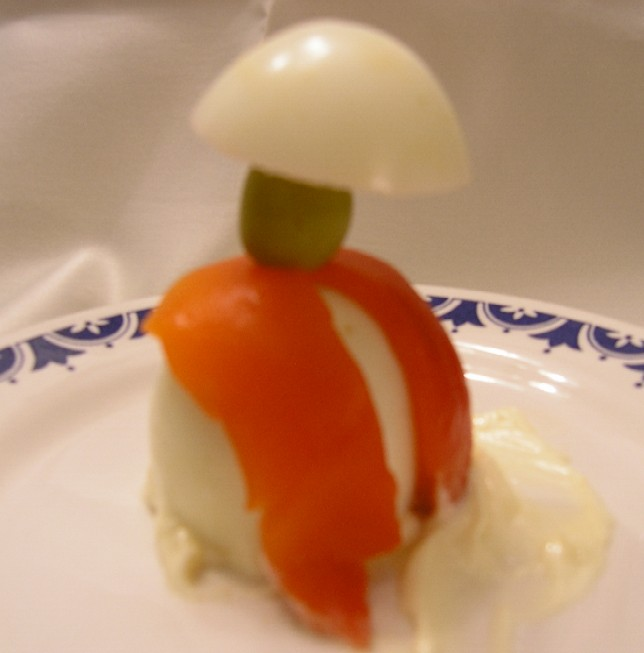 Variedad de tapa, entrante o aperitivo